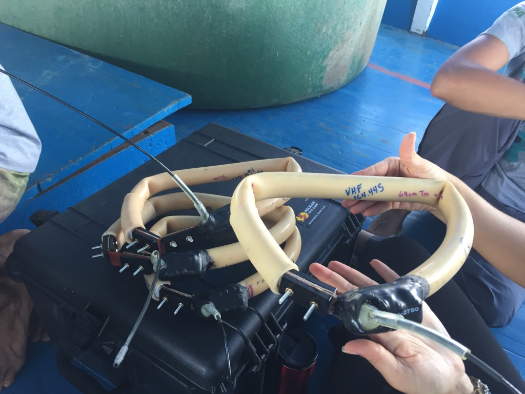 Programa de reintrodução do Peixe-boi amazônico realizado pelo INPA (Instituto Nacional de Pesquisas da Amazônia) e colaboradores.